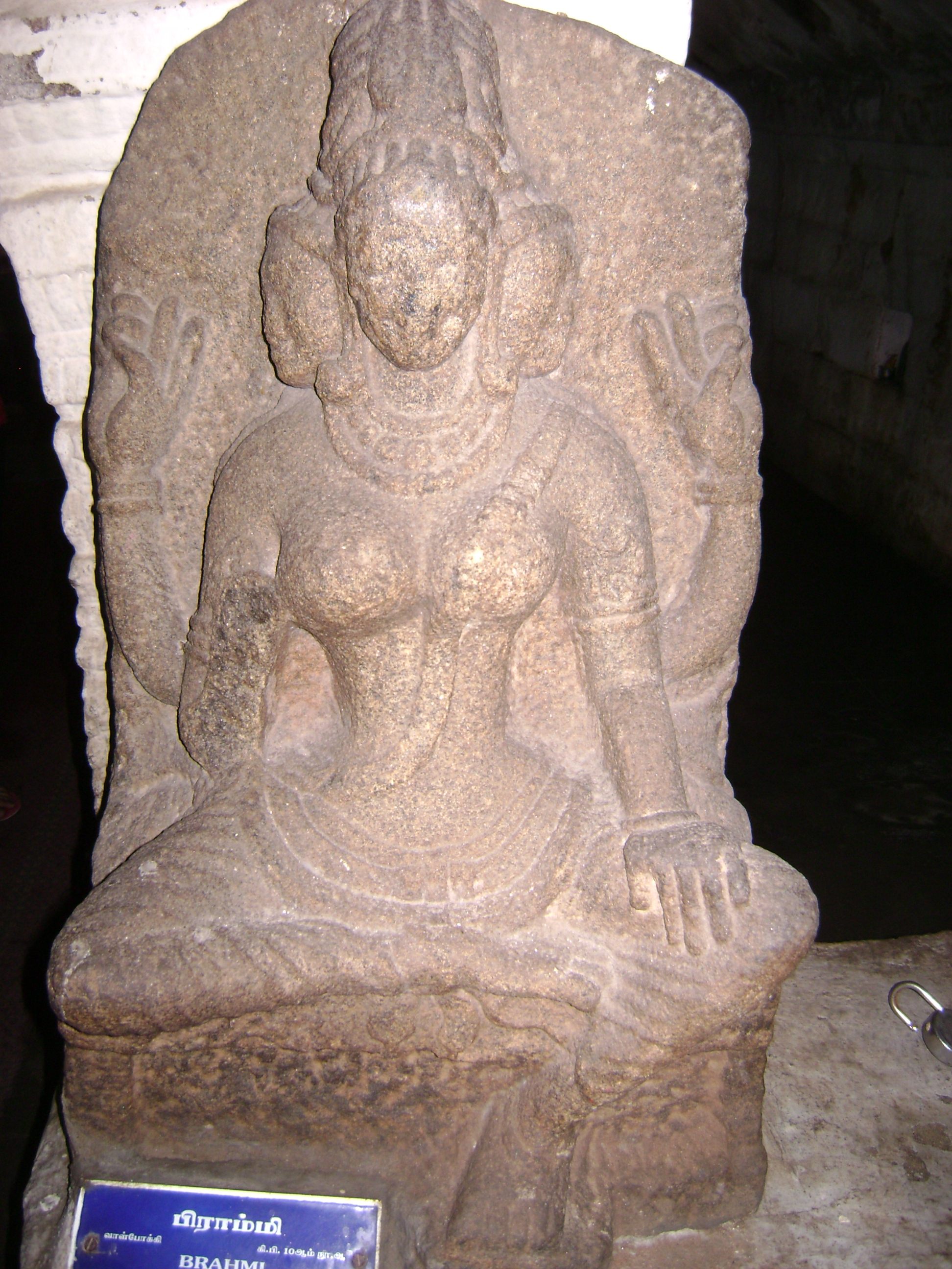 பிராம்மி அம்மன் சிலை, குற்றாலம் தொல்லியல் அருங்காட்சியகம்.